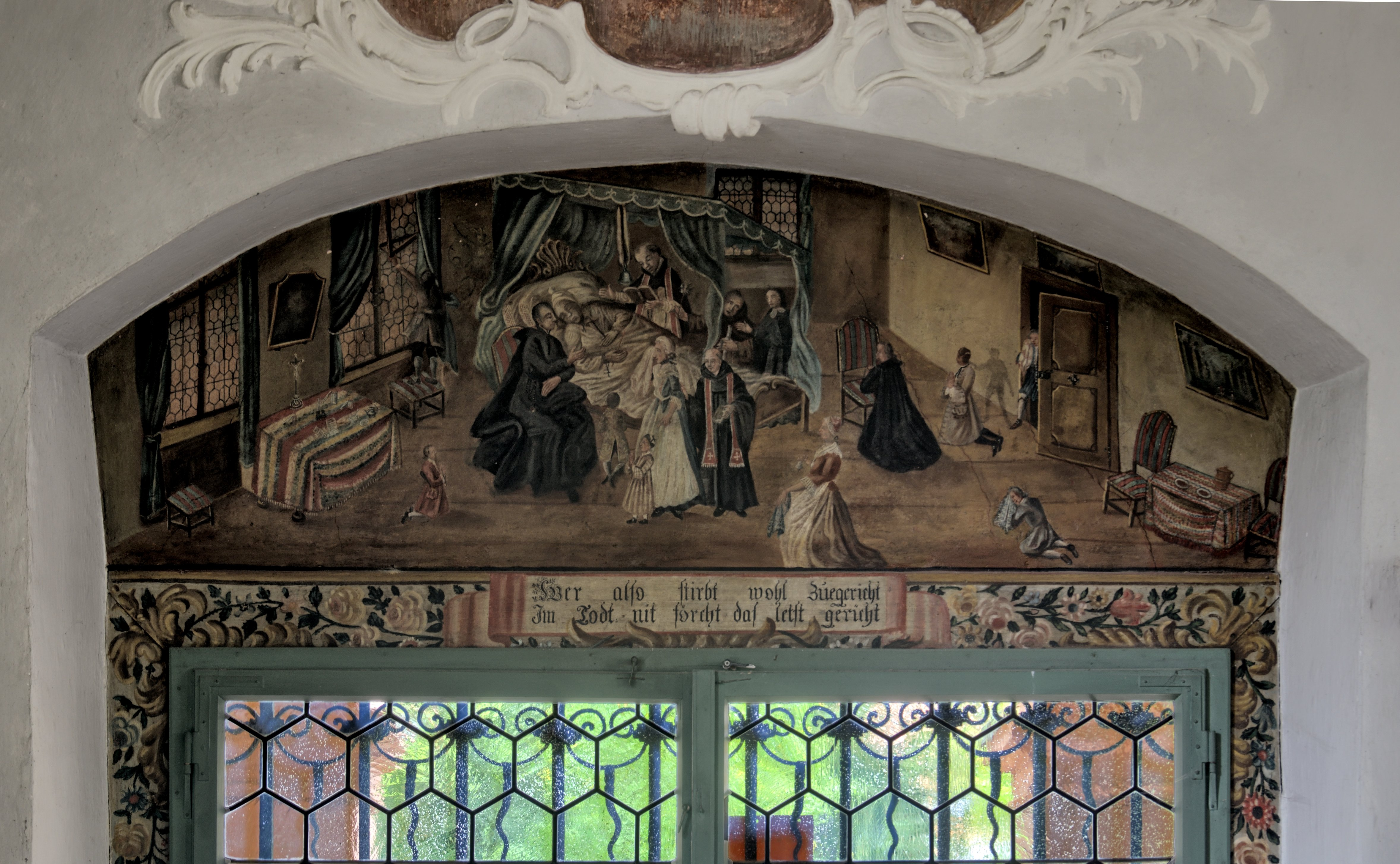 Bilder des Innenraums der St. Michaelskapelle auf dem alten Friedhof in Freiburg